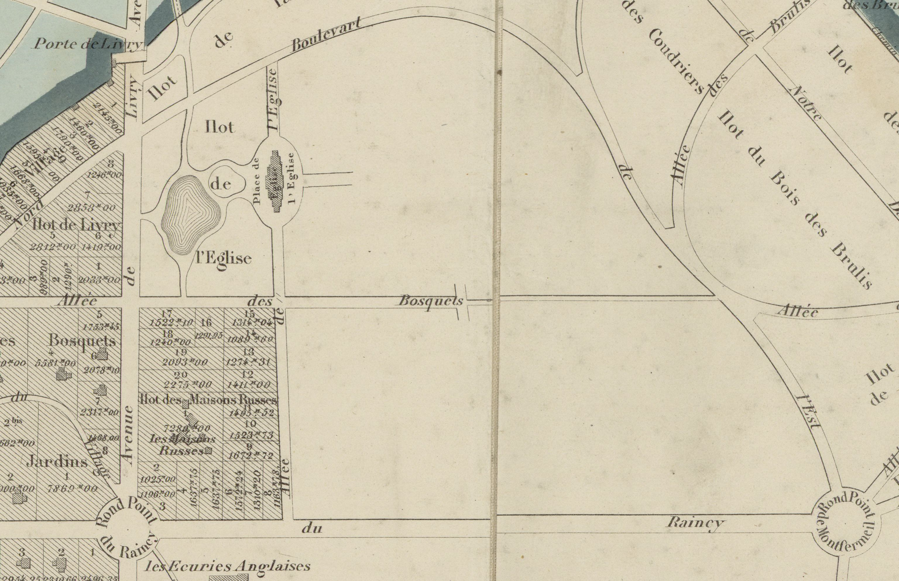 Plan général du lotissement du parc du Raincy... / dressé par Lazare, A. (18..-18.. ; ingénieur géomètre). ; et Lefebre (18..-18..?). Dessinateur au siège de la Compagnie (Paris) Publication date : 18..